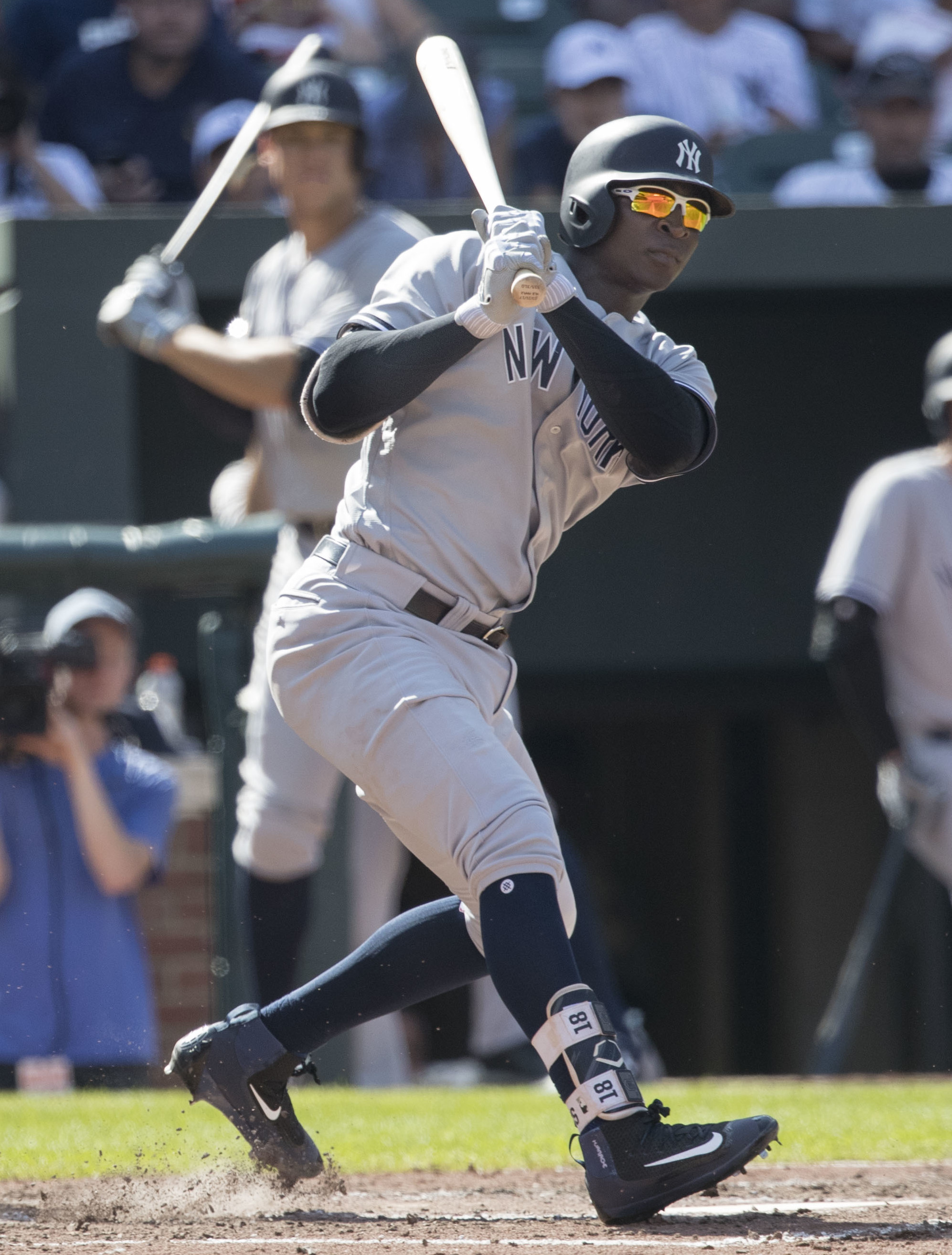 Yankees at Orioles 9/4/17